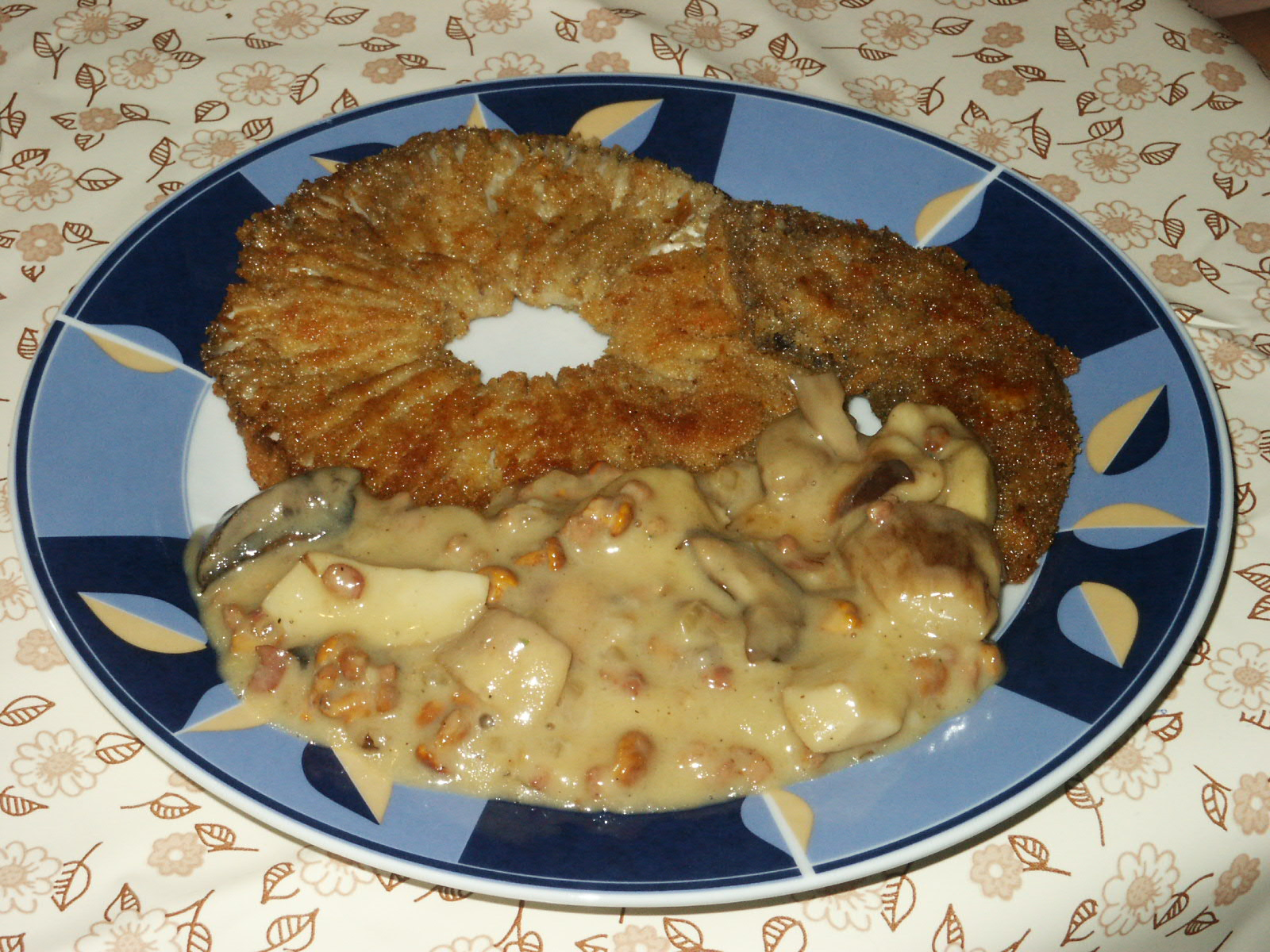 panierter Parasol mit Pilzsauce